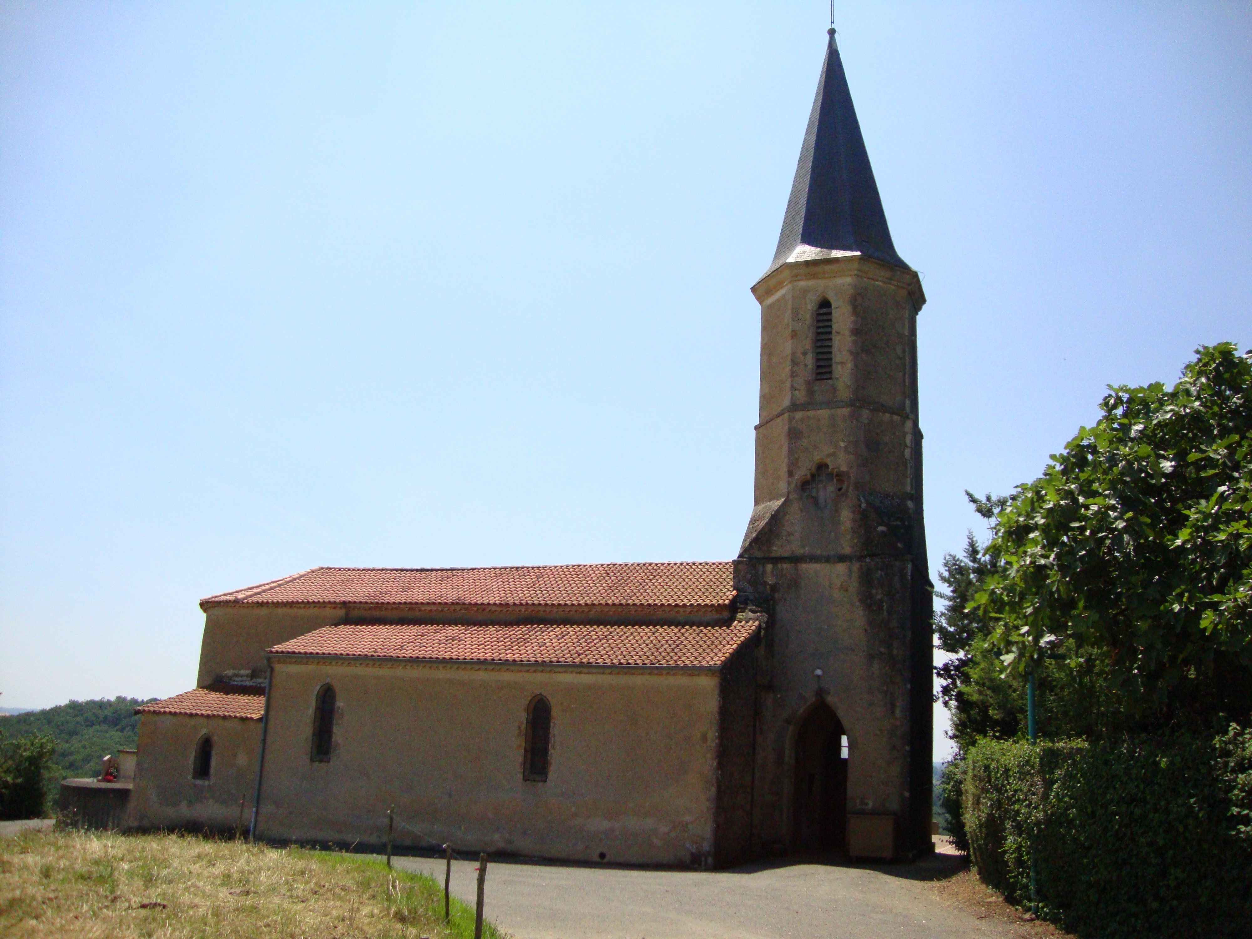 Laveraët (Gers, Fr) église.